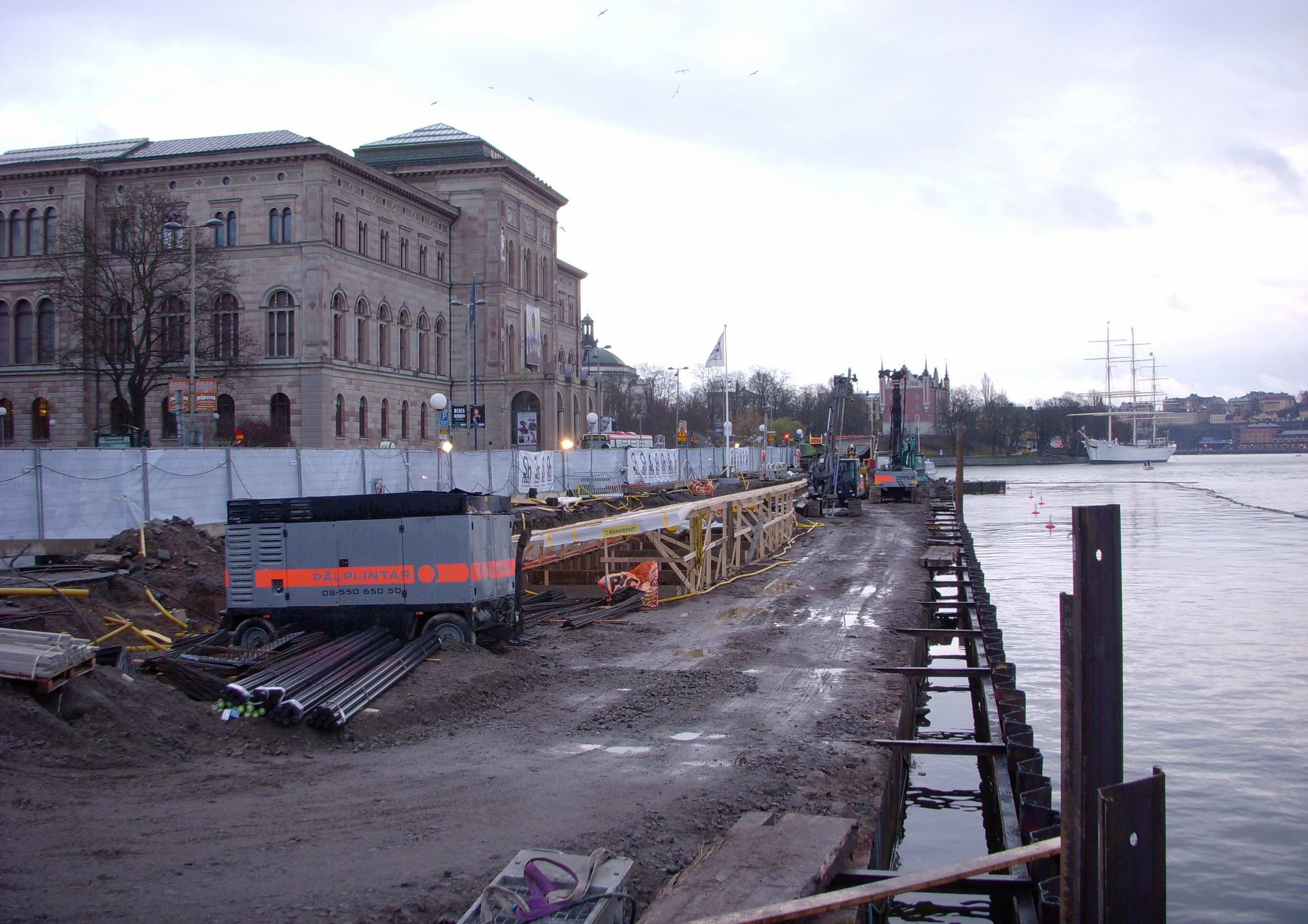 Ombyggnad av Södra Blasieholmshamnen i Stockholm